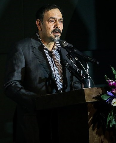 نگاره‌ای از مراسم بزرگداشت سه نسل از هنرمندان دوبله ایران